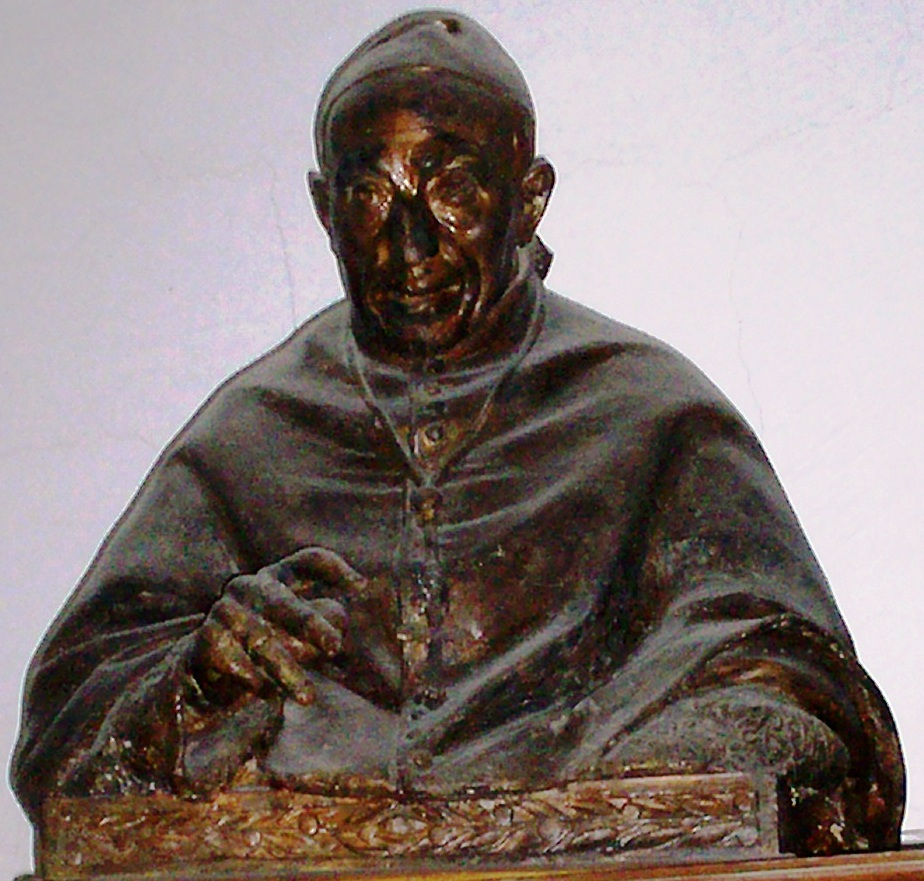 busto raffigurante mons. Luigi Sodo sito nella Collegiata di San Martino in Cerreto Sannita (Bn)